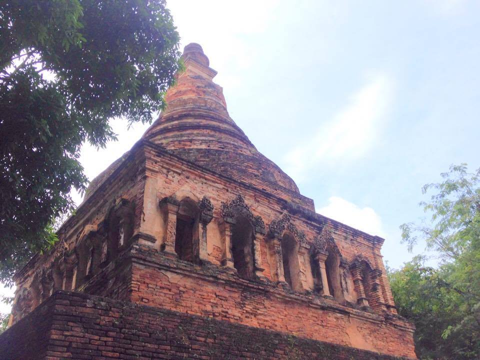 เจดีย์วัดป่าแดงร้าง